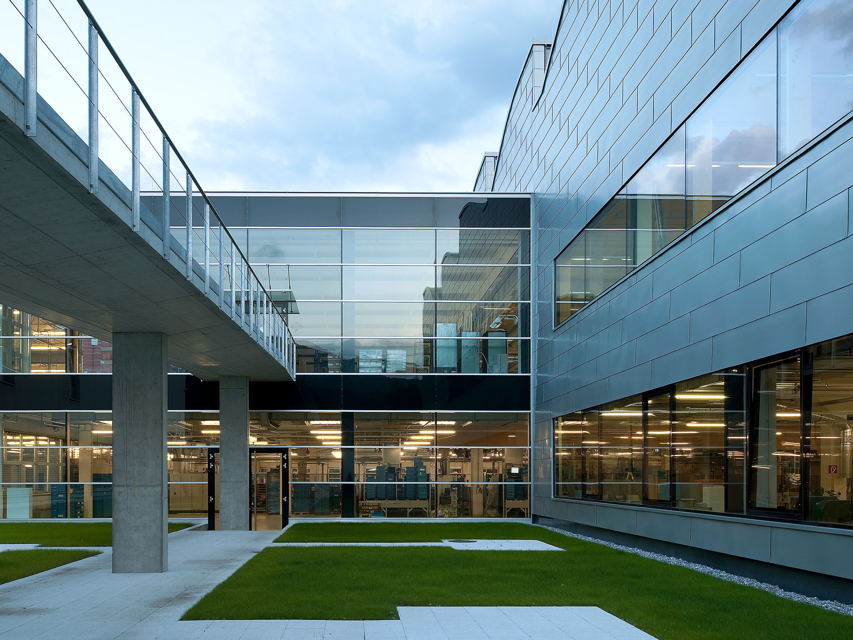 Erster nach ÖGNI (Silber) zertifizierter Industriebau Österreichs, das Produktions- und Logistikgebäude Hilti P4plus, Thüringen (Österreich)